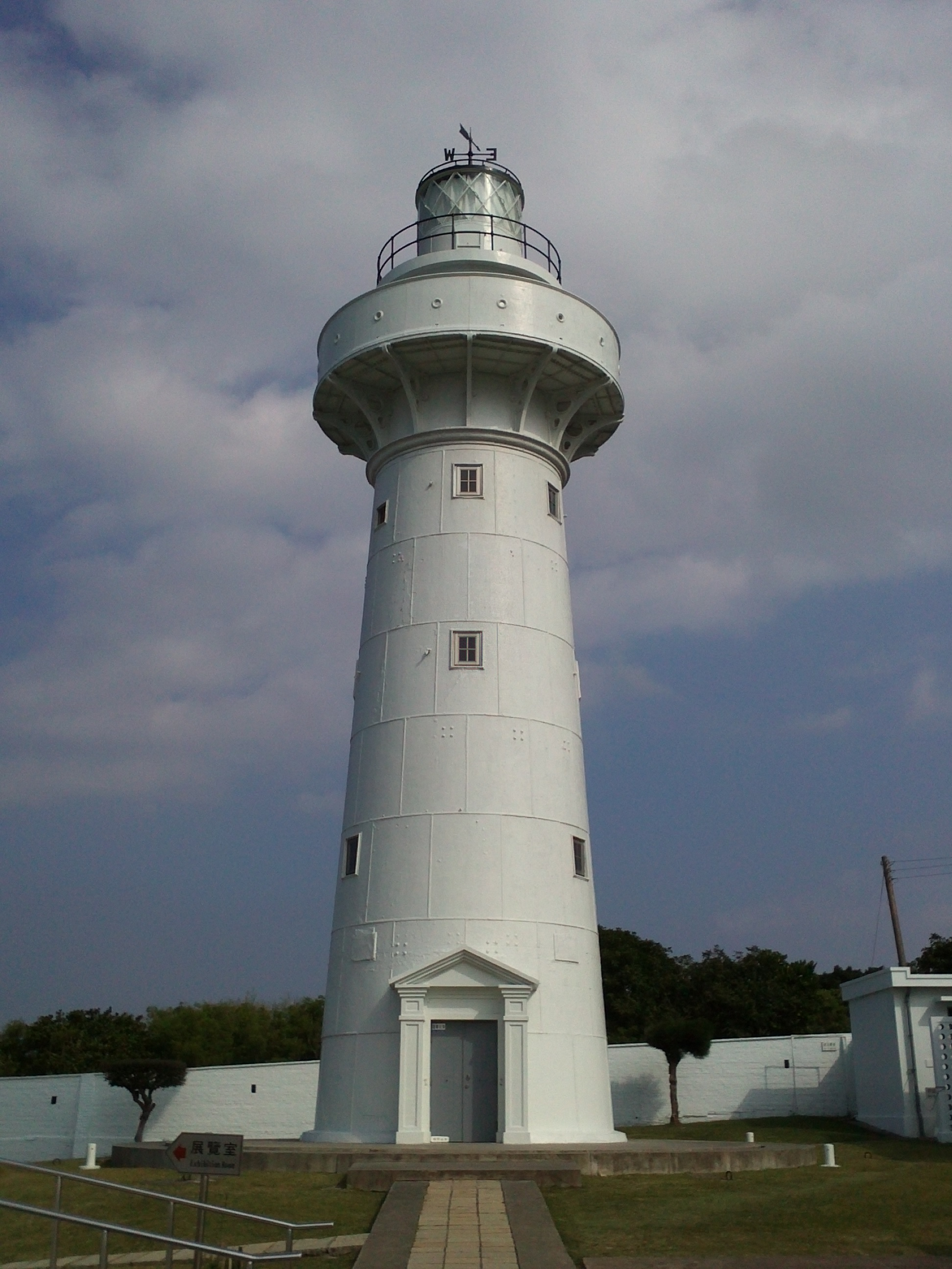 鵝鑾鼻燈塔正面。